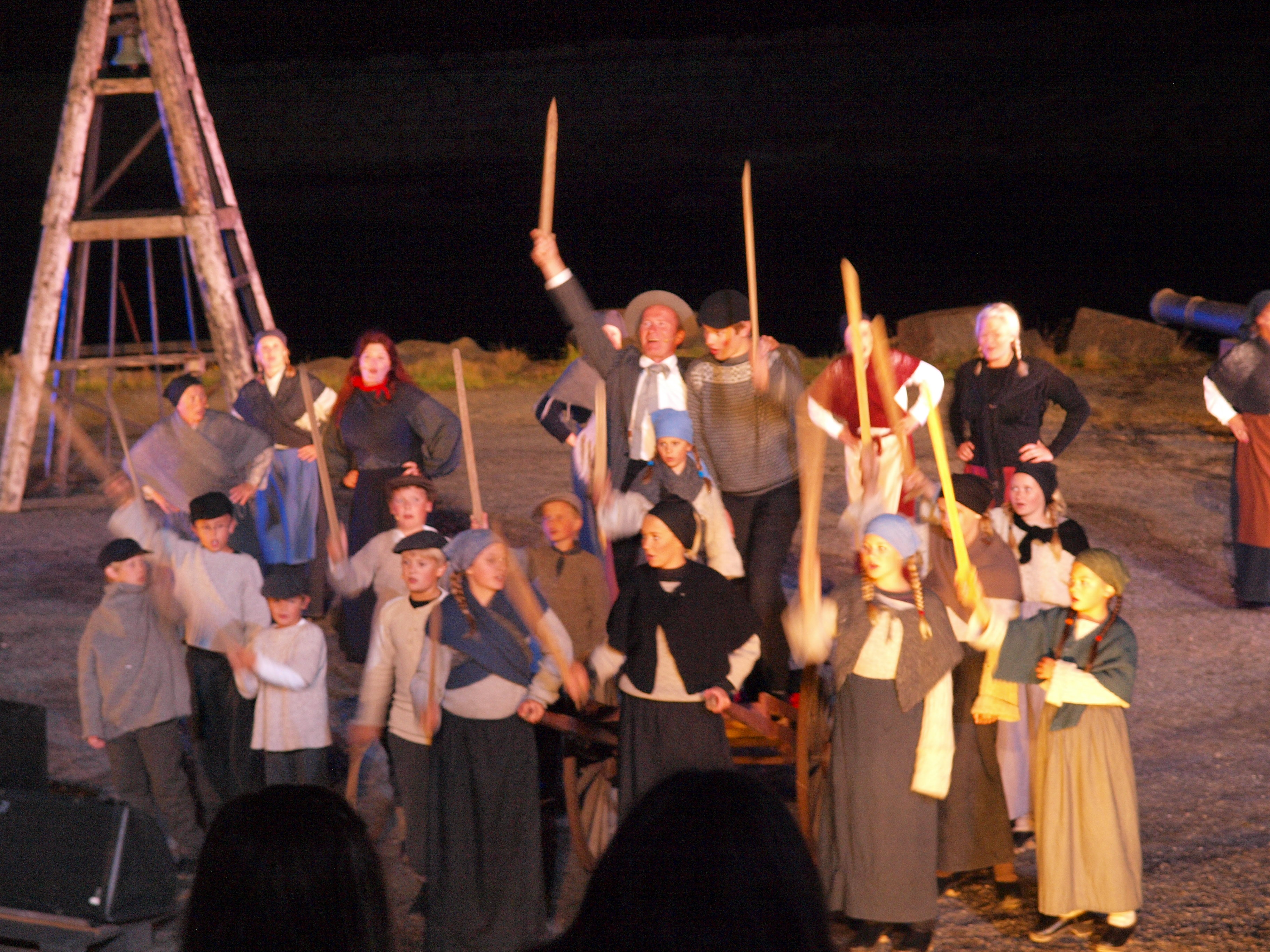 Strandaspelet "Klokkene i Vammelsund" framført i Sogndalstrand Amfi. Historisk spel fra Napoleons-krigene på begynnelsen av 1800-tallet. Spelet framført 9 ganger fra 2001 til 2010. Profesjonelle skuespillere i kombinasjon med en rekke amatører. Ca. 70 personer involvert.